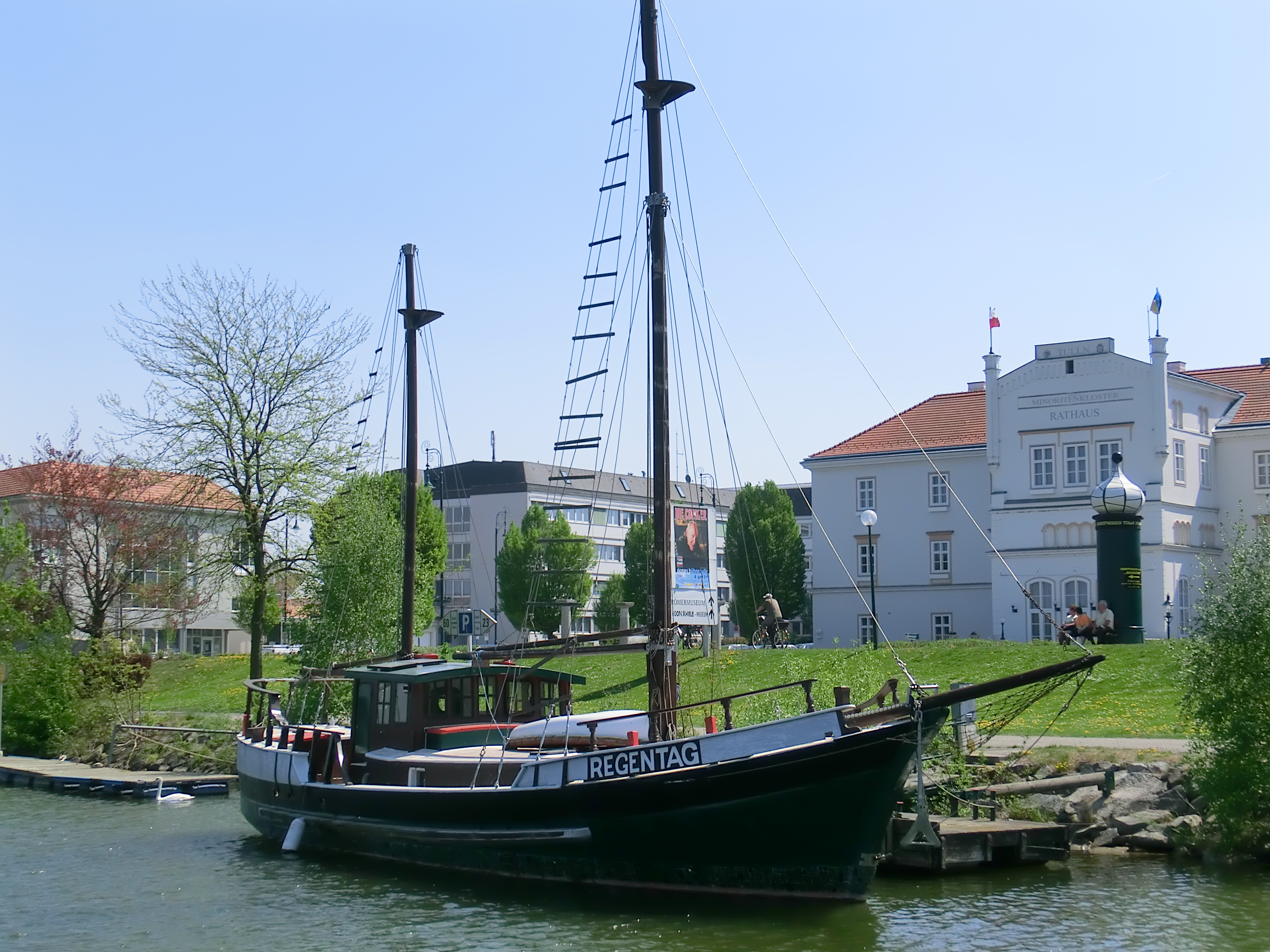 das Schiff von Friedensreich Hundertwasser in Tulln an der Donau